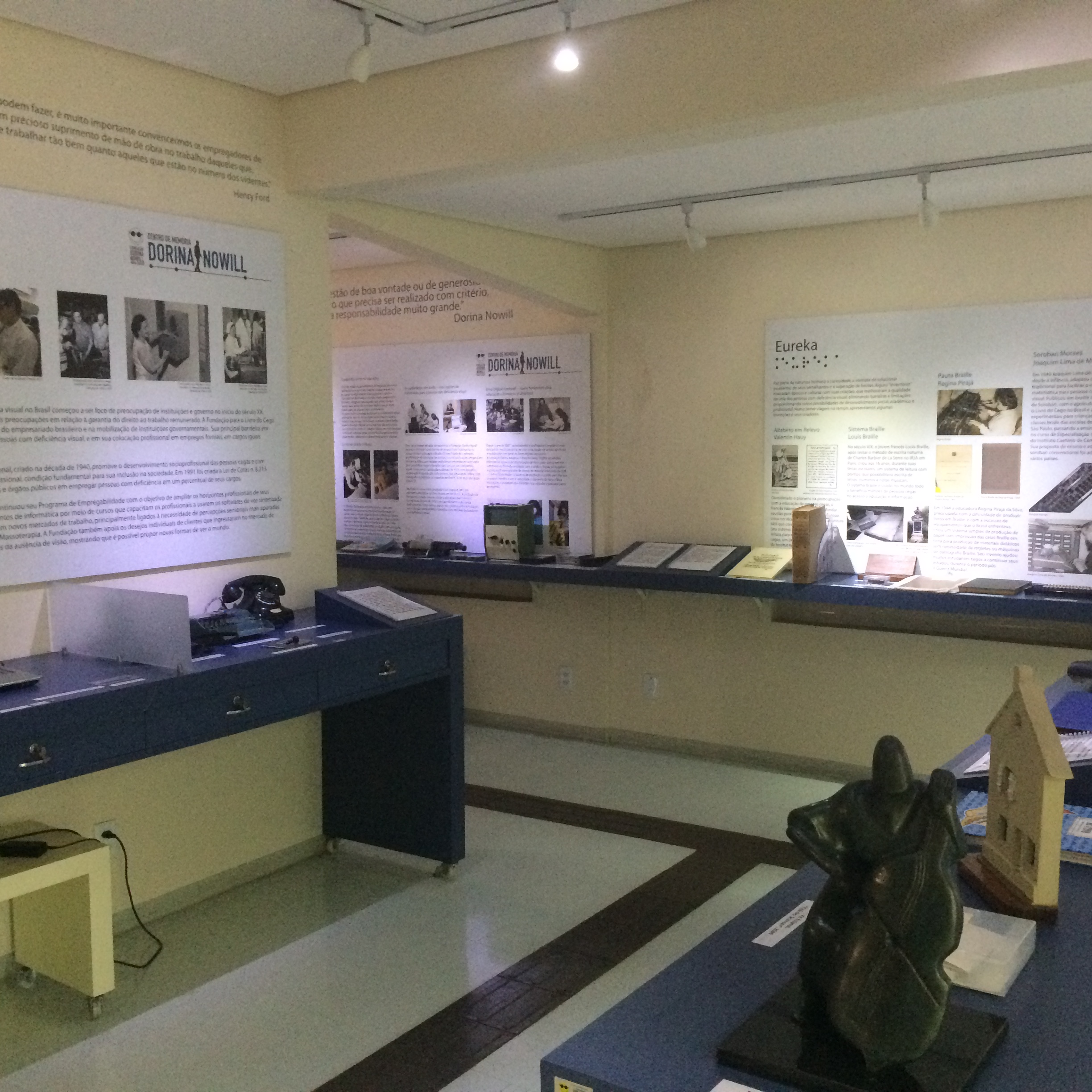 Exposição com objetos referentes a história da fundação e de Dorina